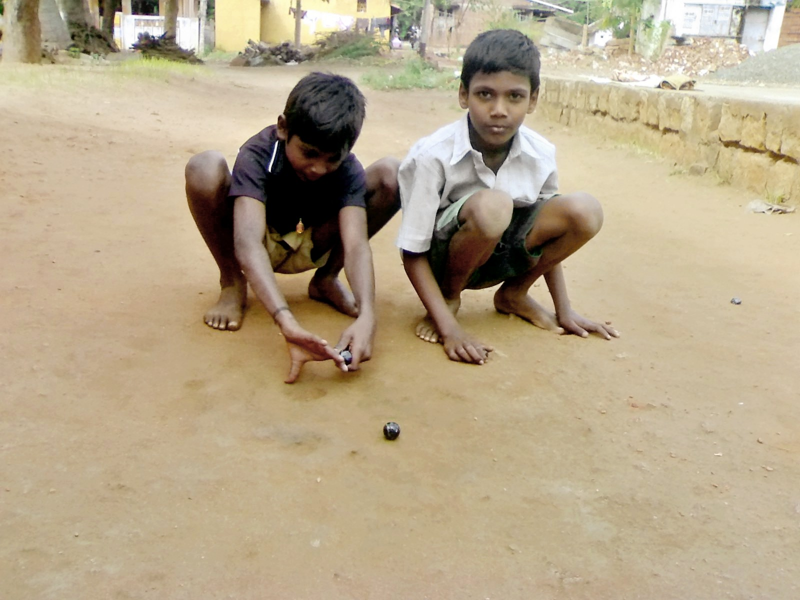 தமிழகத்தின் தெருவிளையாட்டுக்களில் ஒன்றான கோலி குண்டு விளையாடும் சிறுவர்கள். இடம்: மதுரை அருகே உள்ள ஒரு கிராமம்